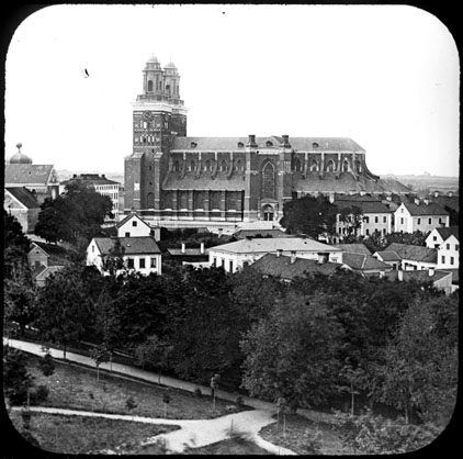 Uppsala domkyrka före ombyggnaden på 1880-talet. Fotografi av Eugène Trutat.